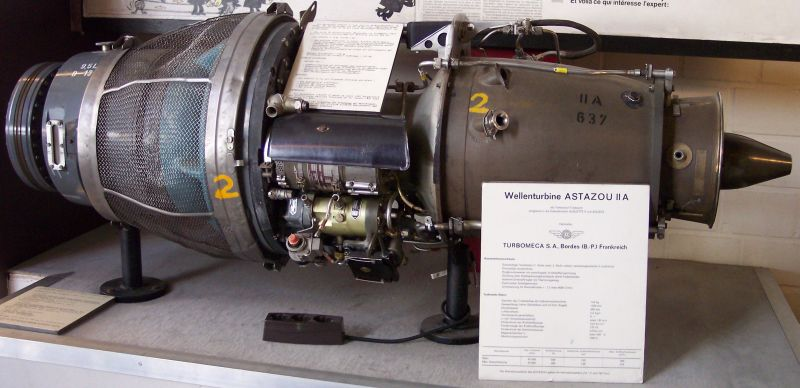 Turbomeca Astazou IIA, eigenes Bild